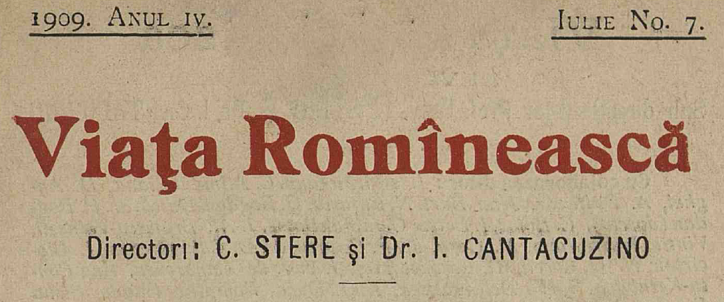 Coperta revistei Viaţa Românească, România, din anul 1909